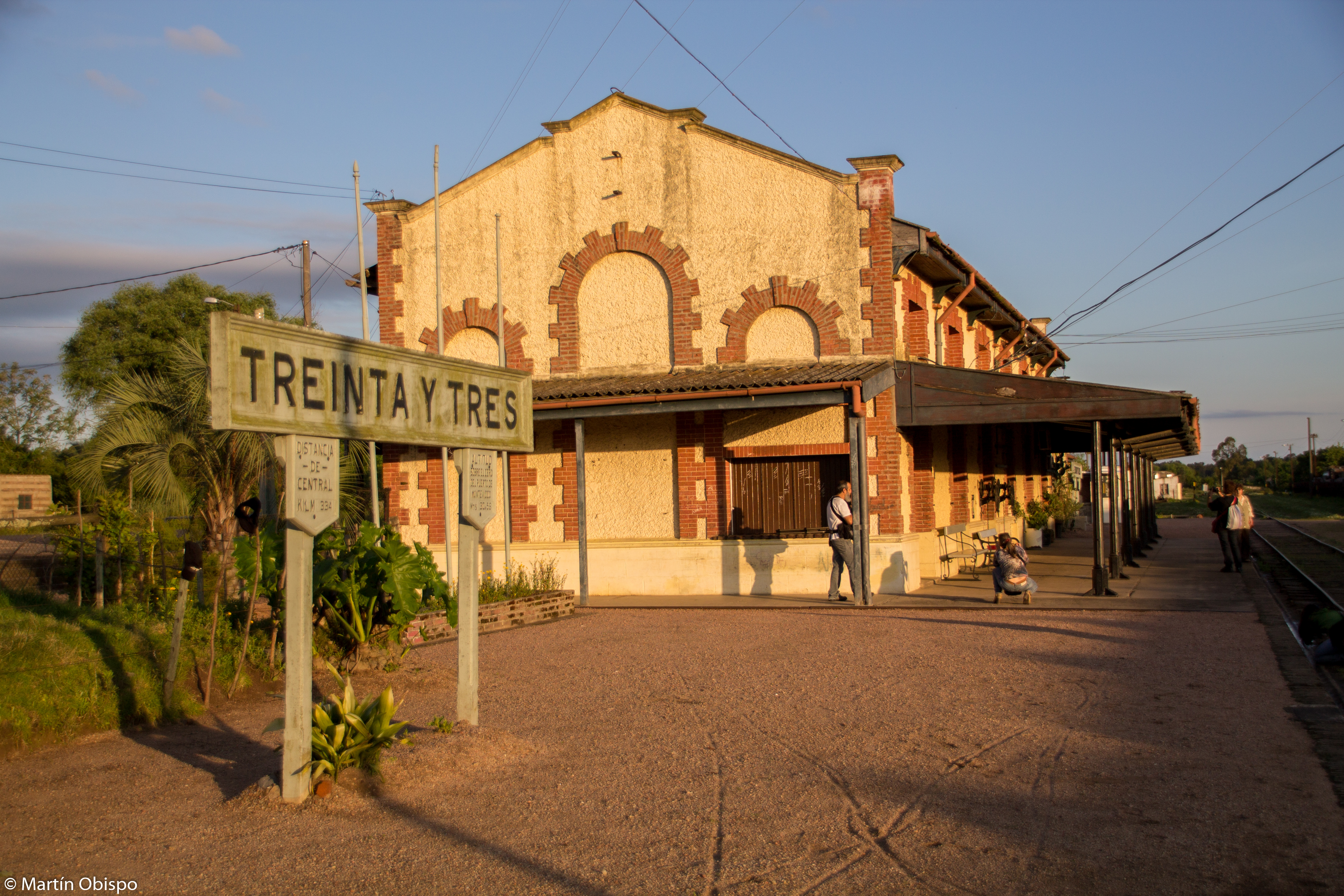 Estación de trenes de AFE.